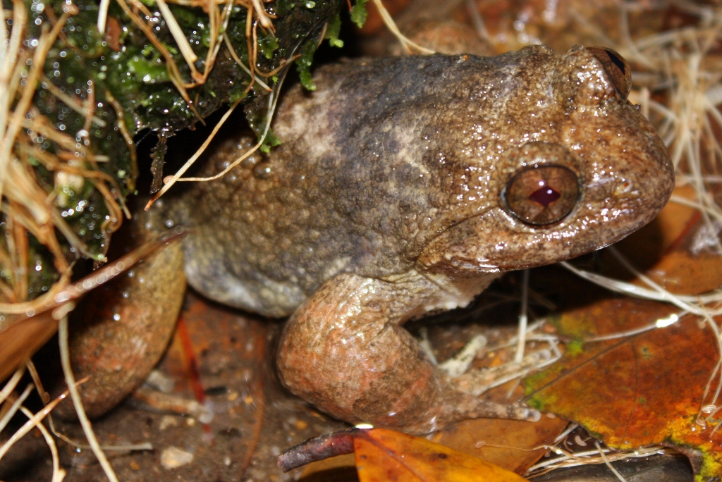 Taken in Tai Po Kau.